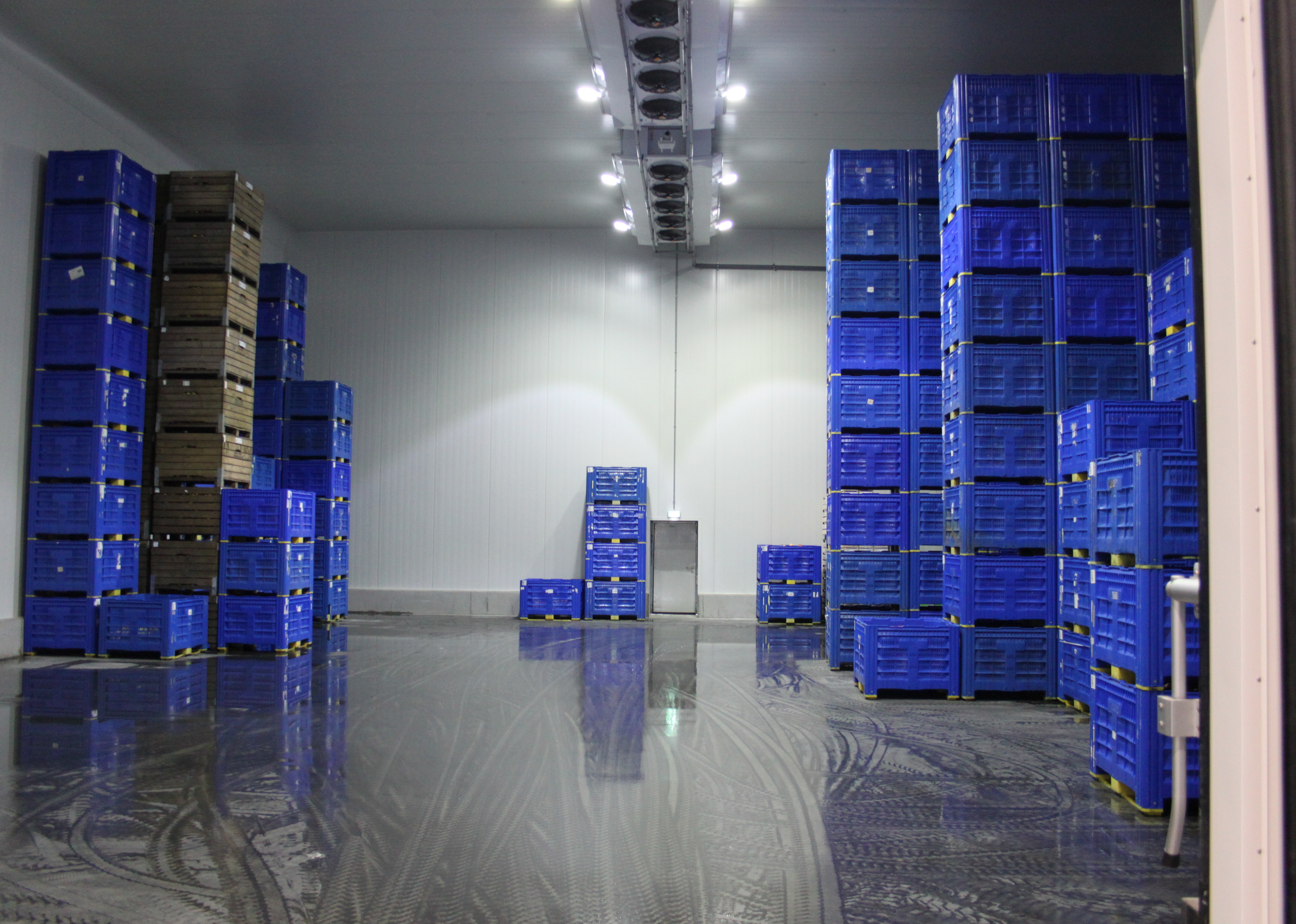 Kühlraum mit Plastik-Großkisten, Elbe-Obst Jork